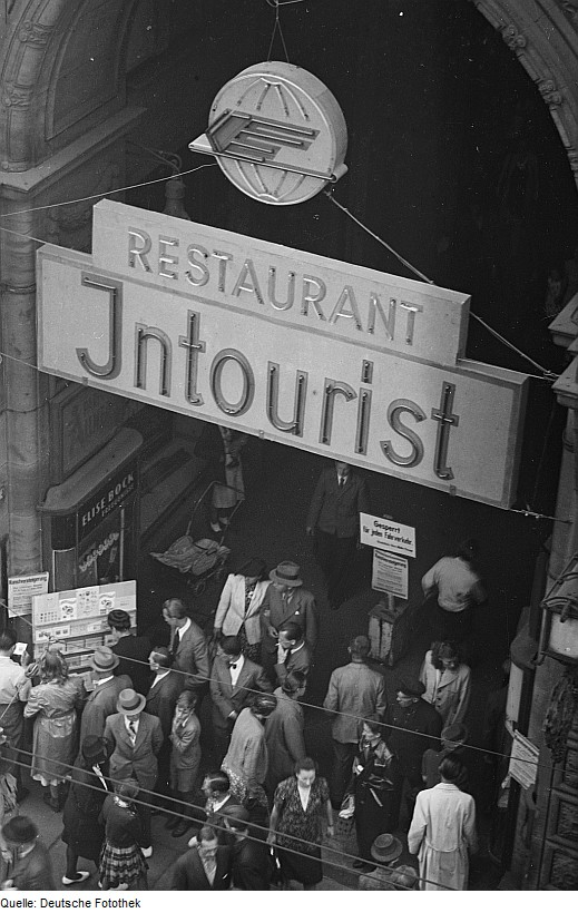 Original image description from the Deutsche FotothekGrimmaische Straße, Zugang zur Mädlerpassage mit Schild der sowjetischen Intourist (Auerbachskeller)